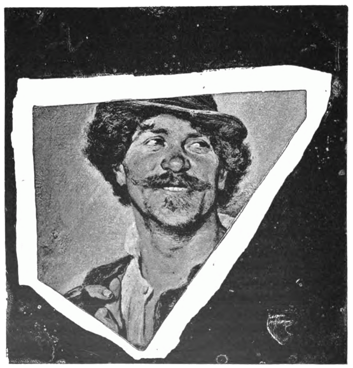 Erster Versuch der Autotypie nach Georg Meisenbach in München aus dem Jahre 1882 nach seinem D. R. P. Nr. 22244 vom 9. Mai 1882